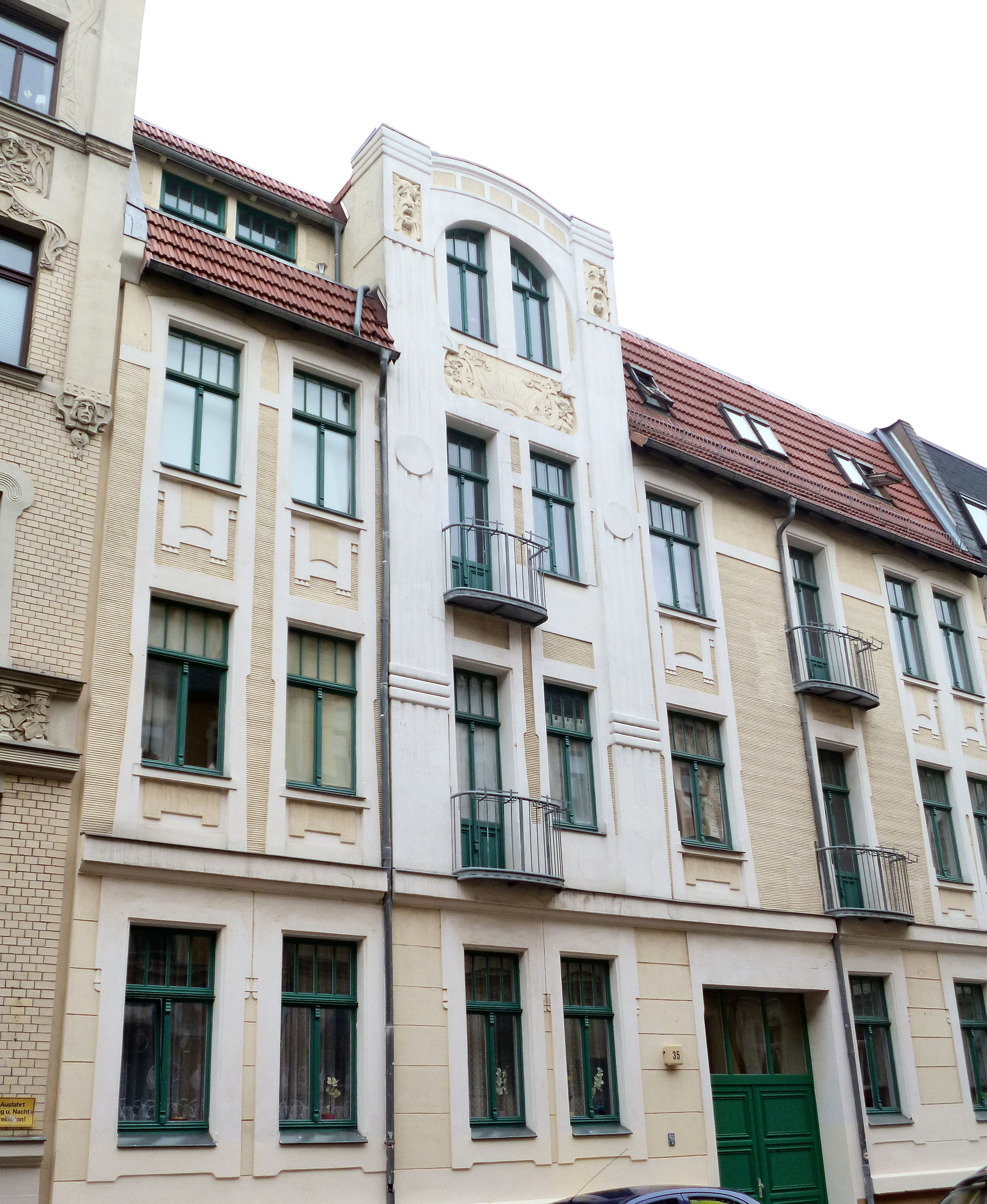 Rudolf-Haym-Straße 35, Halle (Saale)